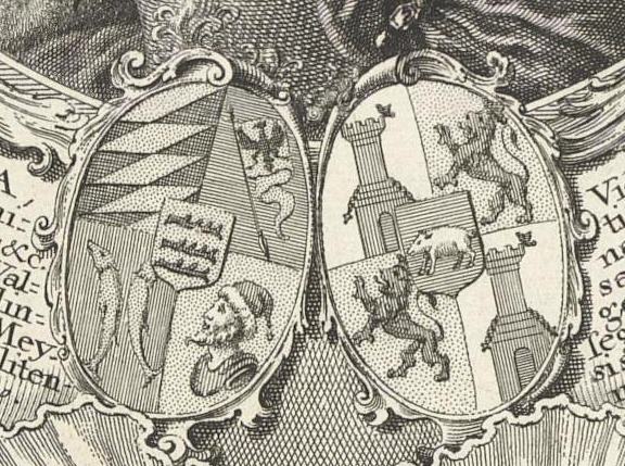 Allianzwappen Württemberg / Thurn und Taxis vom Bildnis der Maria Augusta von Württemberg, geb. von Thurn und Taxis Coburg, Kunstsammlungen der Veste Coburg, Inventar-Nr. II,414,9, Mappe 6, Passepartout 4